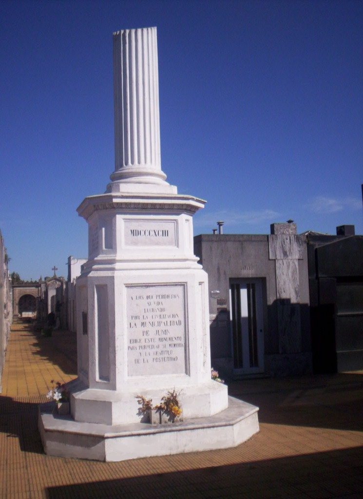 Columna en homenaje a los caídos en la lucha por la civilización, en el Cementerio Central de Junín, Argentina.